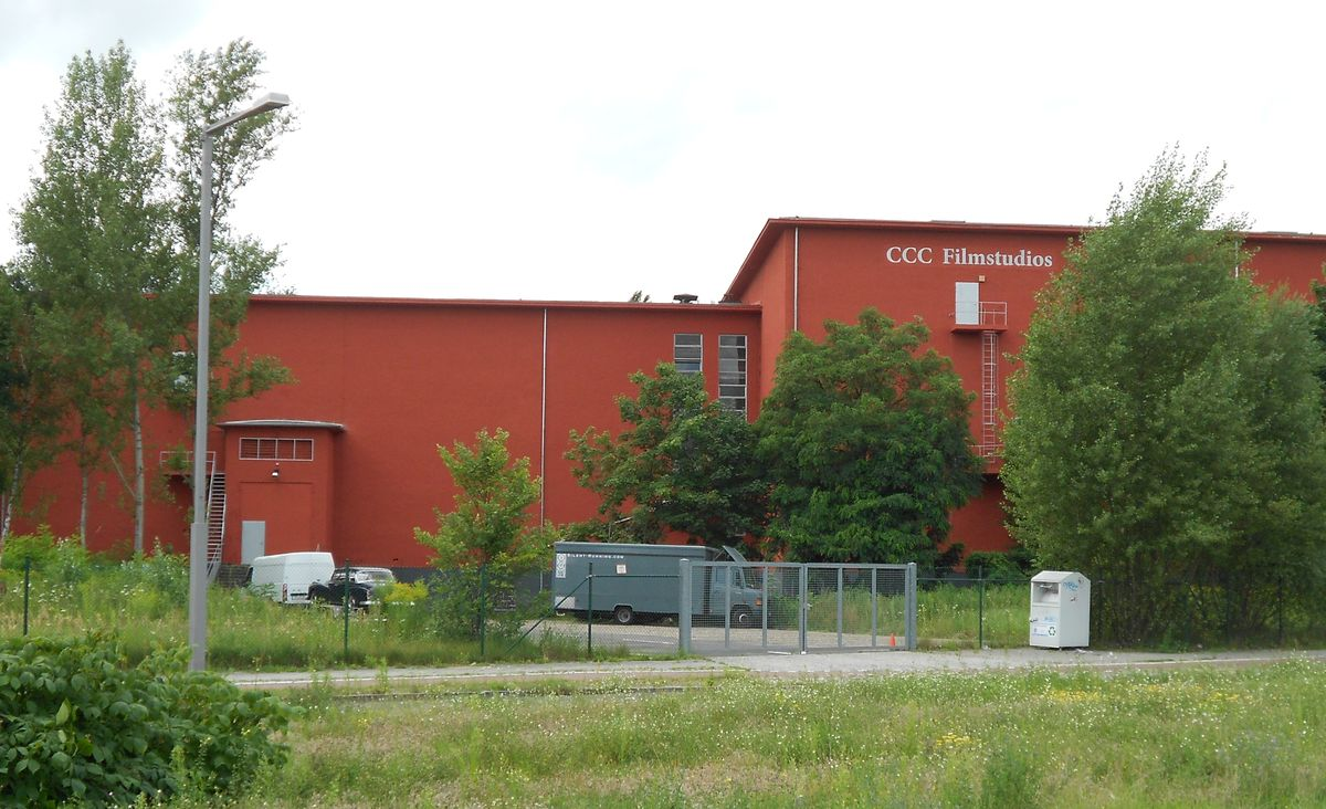 zwei der drei Filmstudios vom Blick der Daumstraße